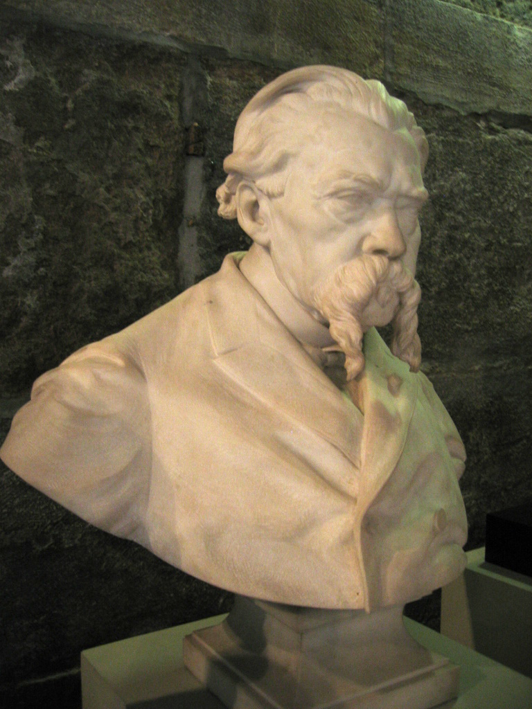 Buste représentant Jean Gigoux, oeuvre du sculpteur Aimé-Jules Dalou, exposé au Musée des Beaux-arts et d'archéologie de Besançon